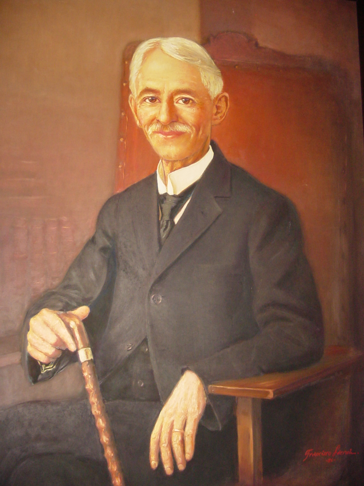 El escritor Tulio Febres COrdero, célebre merideño.